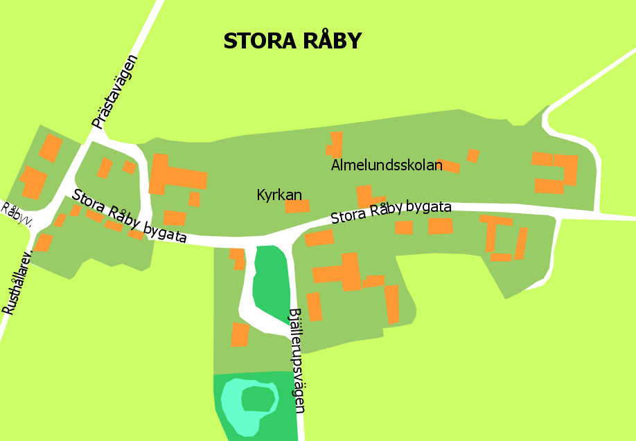 Karta över Stora Råby. Egenproduktion efter flygbild.